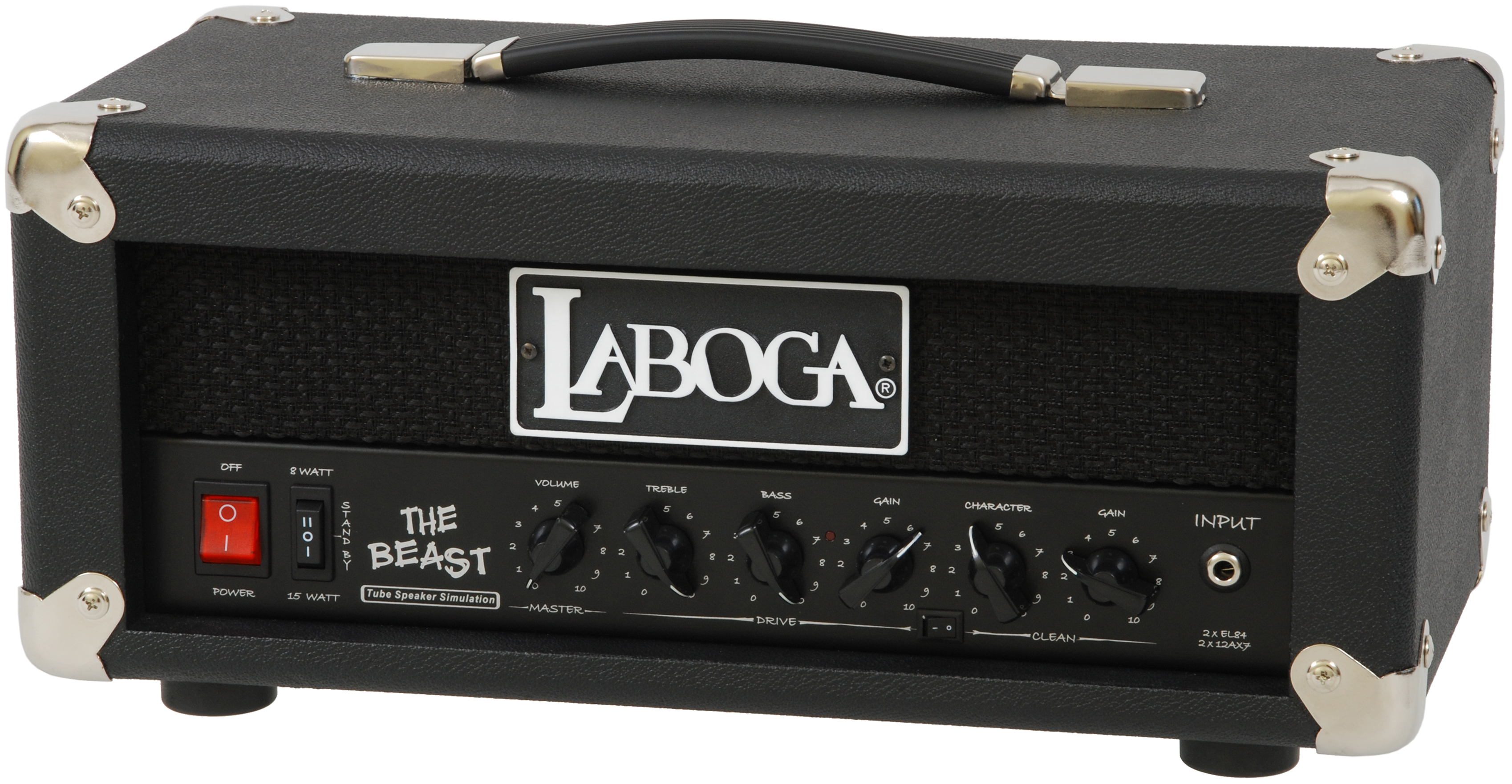 Lampowy wzmacniacz gitarowy (head) 15W/8W The Beast firmy LaBoga